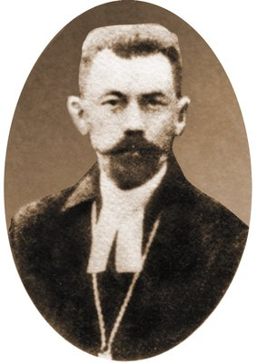 Епископ Теофил Мейер (1865—1934) Фотография начала XX века